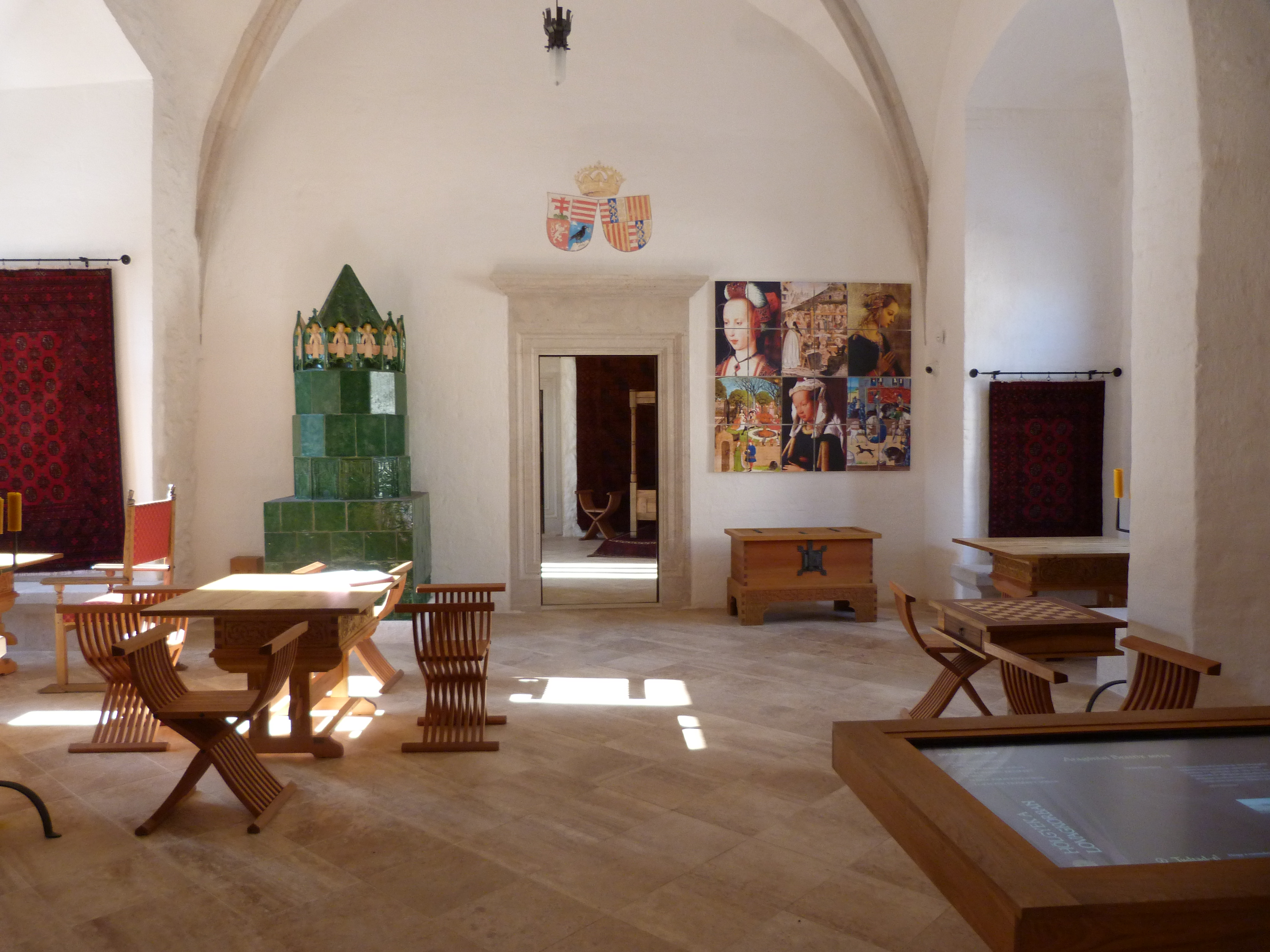 A felvétel 2015. február 7-én szombaton készült Diósgyőr Várában. ©© Derzsi Elekes Andor, Budapest, 2015, A fénykép másolását és felhasználását a szerző ellenérték nélkül, jogutódjaira is kihatóan megengedi. Az engedély kiterjed a kereskedelmi célú hasznosításra is. Kéri azonban nevének feltüntetését a felhasználás során. A Metapolisz sorozat valamennyi képe és filmje Creative Commons alatti valamint kereskedelmi - for profit - célra is felhasználható. Ajánlott hivatkozás: Derzsi Elekes Andor: Metapolisz DVD line